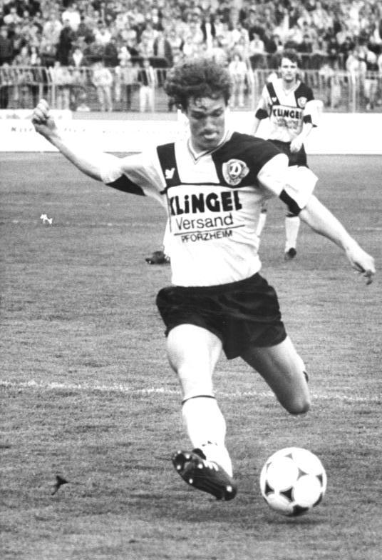 ADN-Häßler-28.4.90 Dresden: 22. Spieltag der Fußball-Oberliga- Dynamo Dresden - FC Berlin 6:1 Torsten Gütschow ließ es im Gehäuse der Berliner gleich dreimal klingeln und befestigte damit seine Spitzenposition in der derzeitigen Torschützen-Liste.